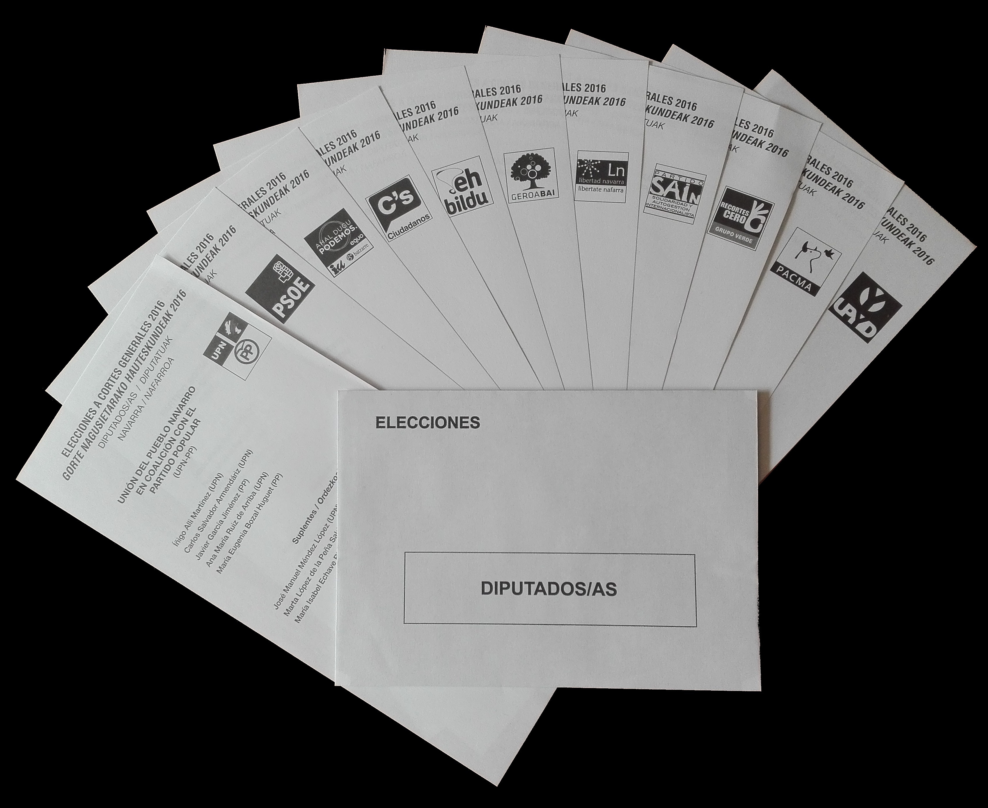 Papeletas electorales y sobre de votación para las Elecciones a las Cortes Generales de 2016 en España por la circunscripción de Navarra. Se muestran las papeletas de las candidaturas de la Coalición entre Unión del Pueblo Navarro y el Partido Popular (UPN-PP), Partido Socialista Obrero Español (PSOE), Unidos Podemos - Elkarrekin Ahal Dugu (PODEMOS-IU-EQUO-BATZARRE), Ciudadanos-Partido de la Ciudadanía (C's), Euskal Herria Bildu (EH Bildu), Geroa Bai (GBai), Libertad Navarra-Libertate Nafarra (Ln), Solidaridad y Autogestión Internacionalista (SAIn), Recortes Cero-Grupo Verde (RECORTES CERO), Partido Animalista Contra el Maltrato Animal (PACMA) y Unión Progreso y Democracia (UPYD).